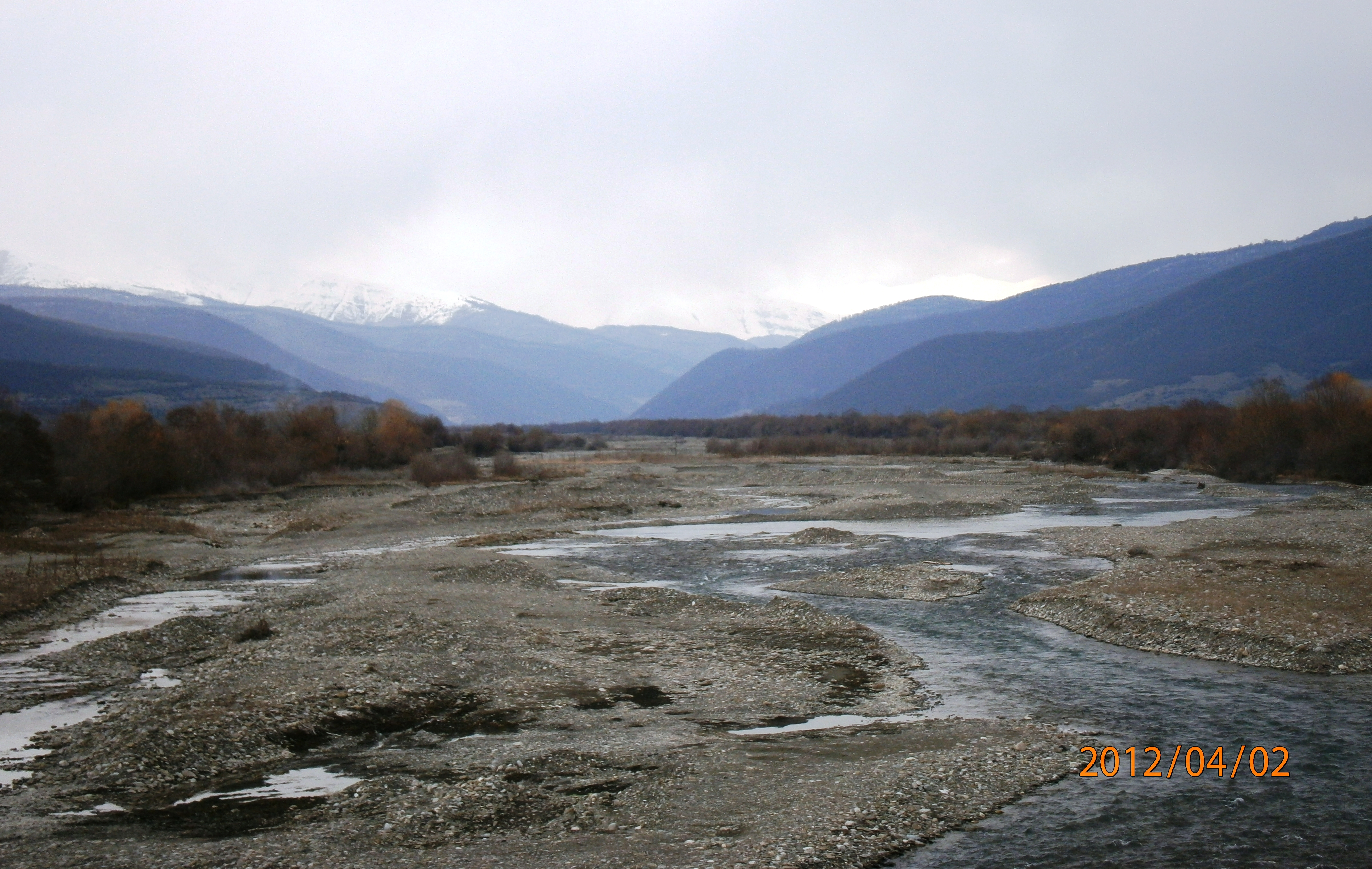 მდინარე იორი